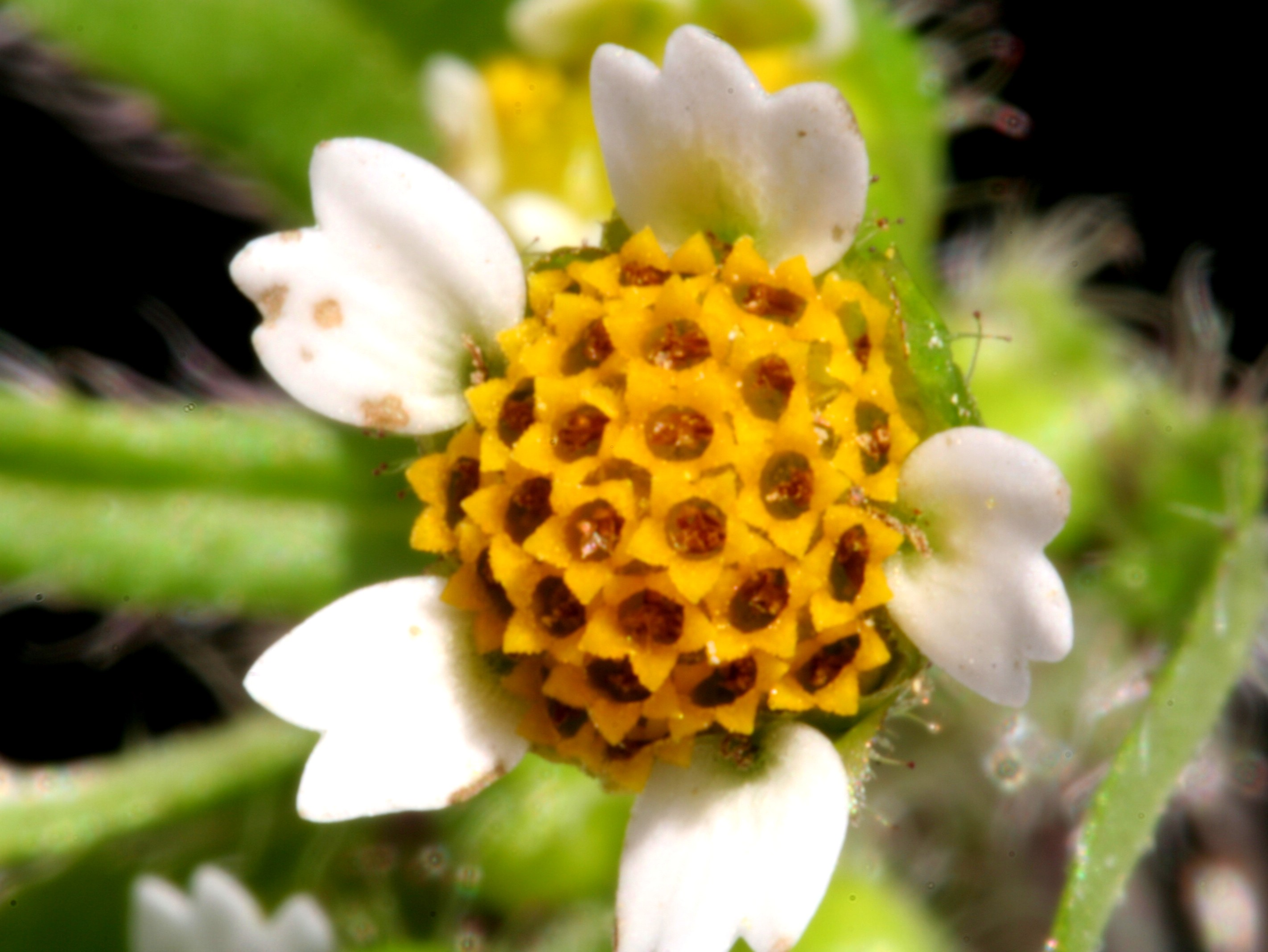 Galinsoga ispida - località: Villa Prima, Limana (BL), 350 m s.l.m.